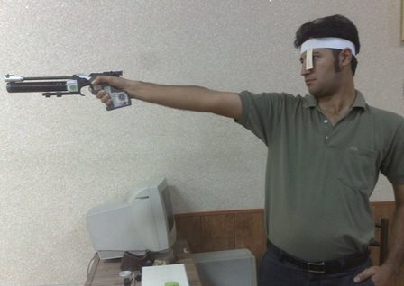 ورزشکار در حال نشانه گیری برای شلیک